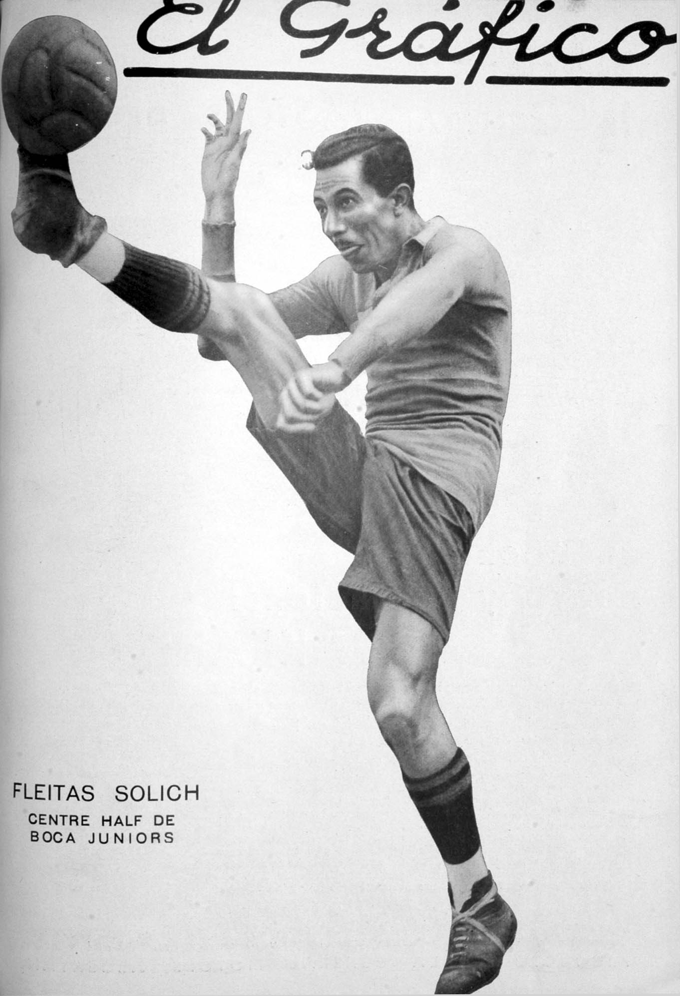 El Grafico del 12 de Abril de 1930. Edicion 561